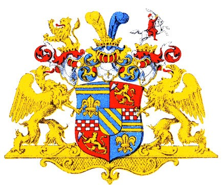 Nierothi suguvõsa krahvivapp